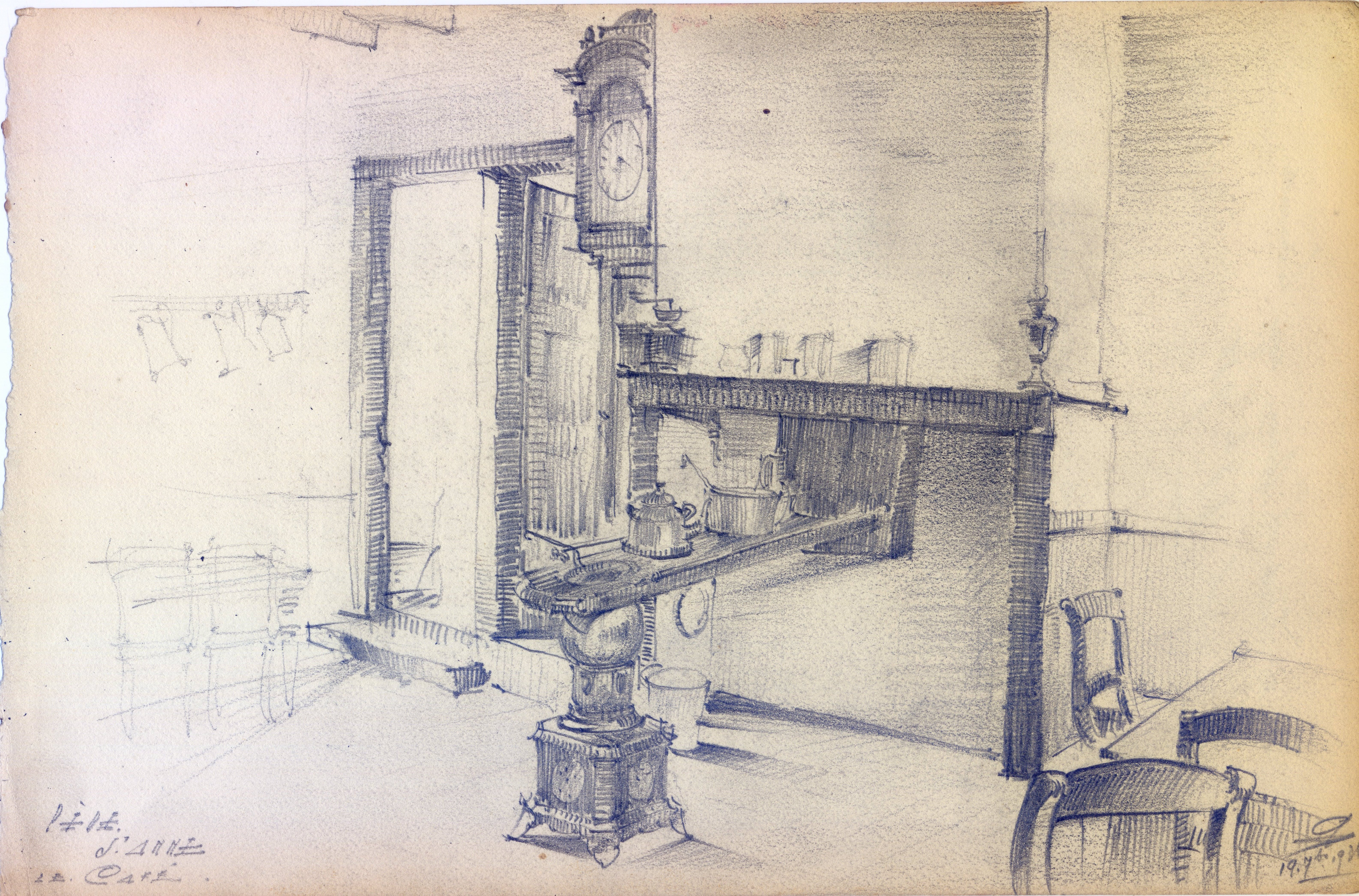 La salle du café de Pede-Sainte-Anne, Belgique, dessin par Léon van Dievoet, architecte, le 19 septembre 1936 (269 x 173 mm)